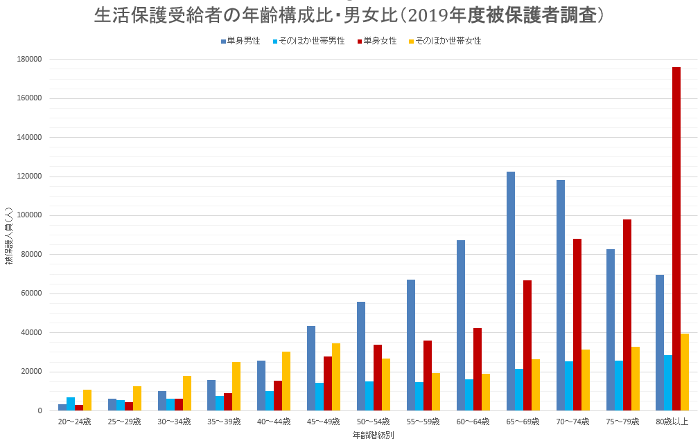 被保護人員、 級地・単身世帯－その他世帯・性・年齢階級別 （厚生労働省：平成21年被保護者全国一斉調査）